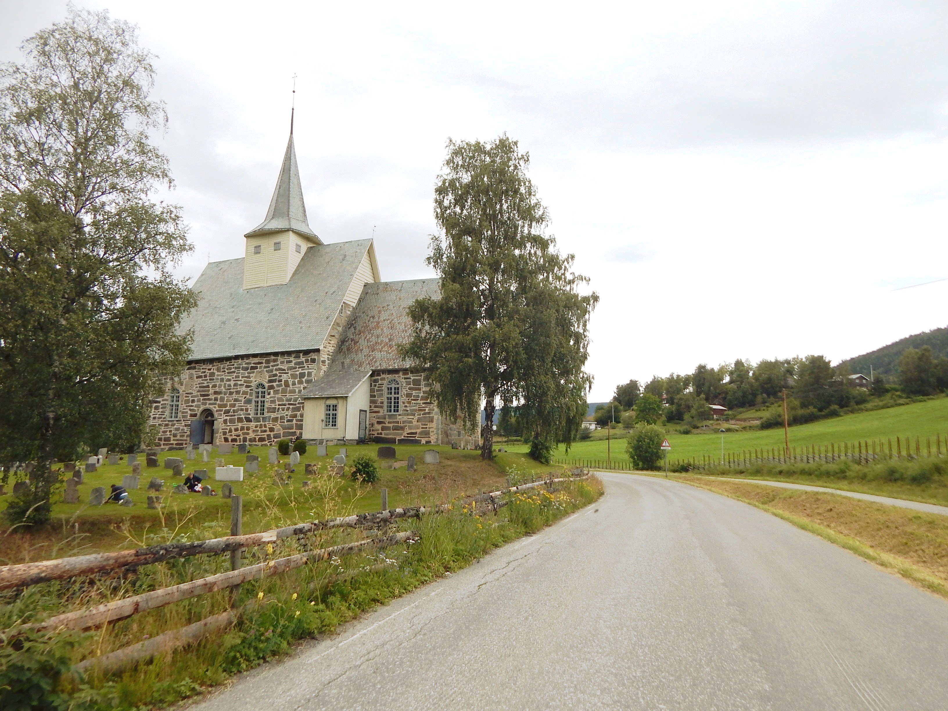 Vøllavegen forbi Slidredomen i tettstedet Slidre